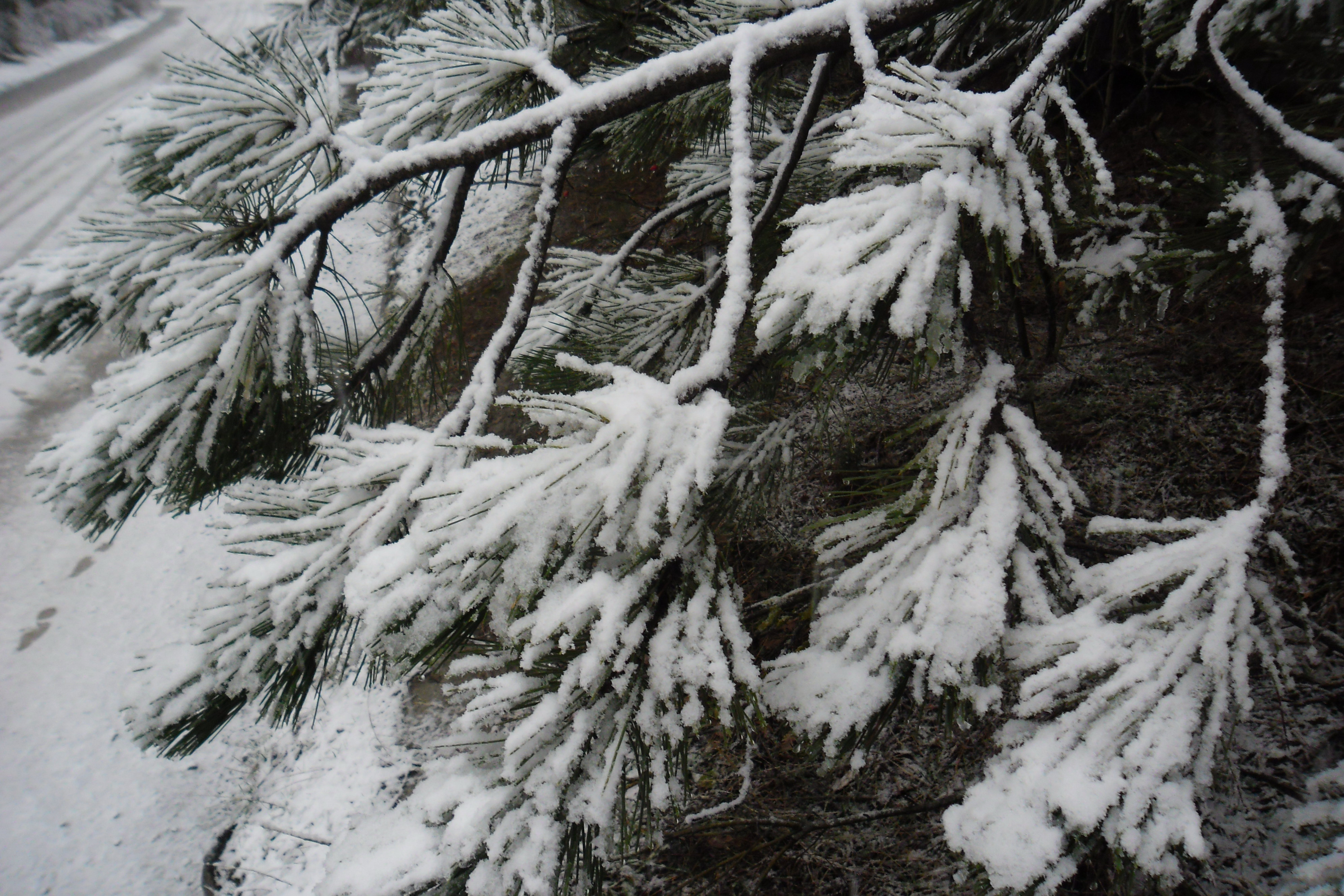 Фото